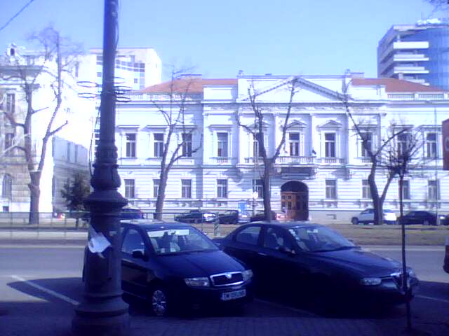 Fosta Prefectură, azi Direcția Generală a Finanțelor Publice a Județului Arad. Clădirea fost ridicată în anul 1821 în stil neoclasic. Pe faţadă se găsesc coloane cu capiteluri corintice şi timpanon. Beciurile clădirii au fost folosite ca temniţe până în 1848. În clădire s-au desfăşurat în noiembrie 1918 tratativele între reprezentanţii Consiliului Naţional Central Român şi delegaţia guvernului maghiar privind soarta Transilvaniei. Sursa informatii